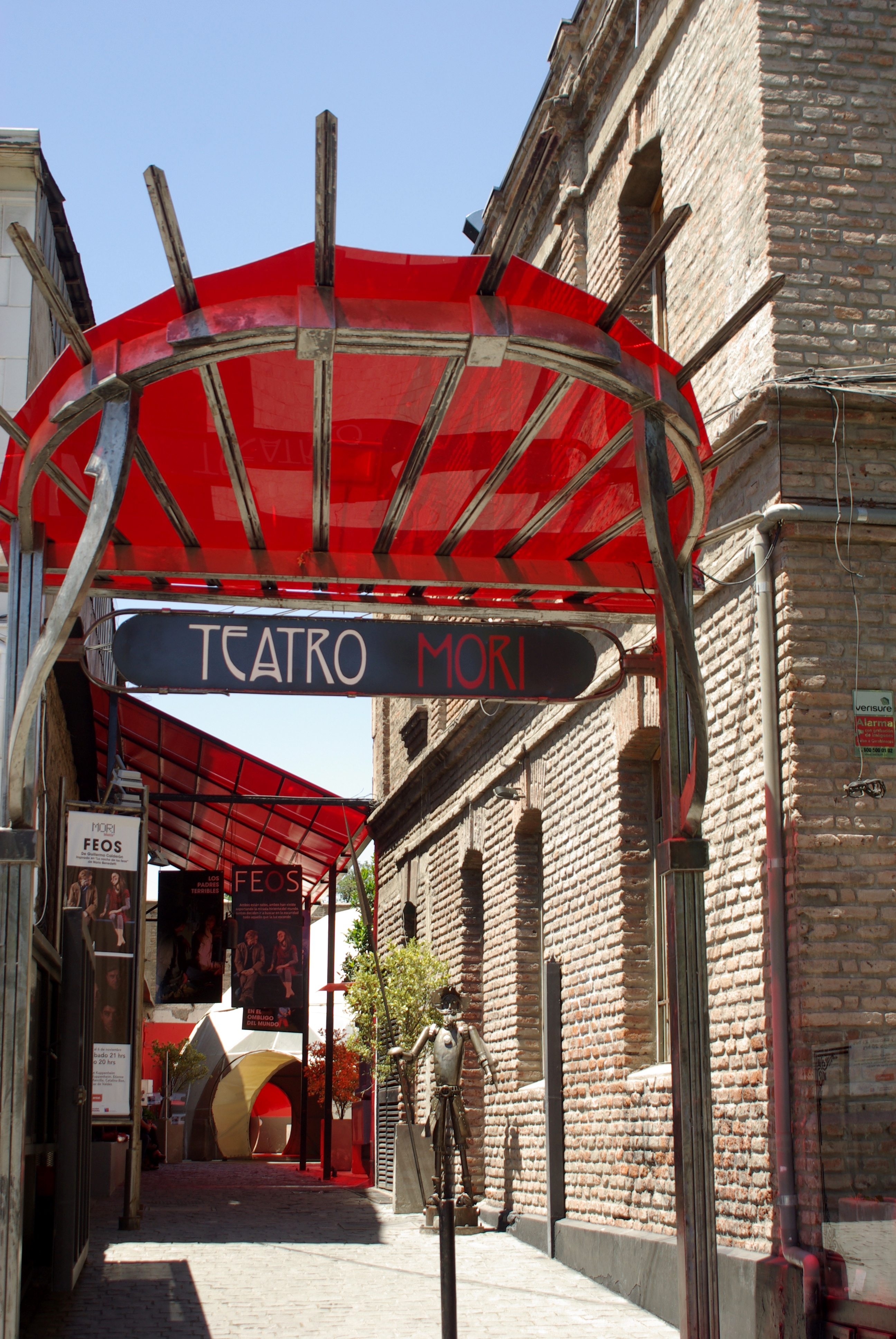 Teatro Mori, junto a la plaza Camilo Mori en la calle Constitución, barrio Bellavista, Santiago de Chile.